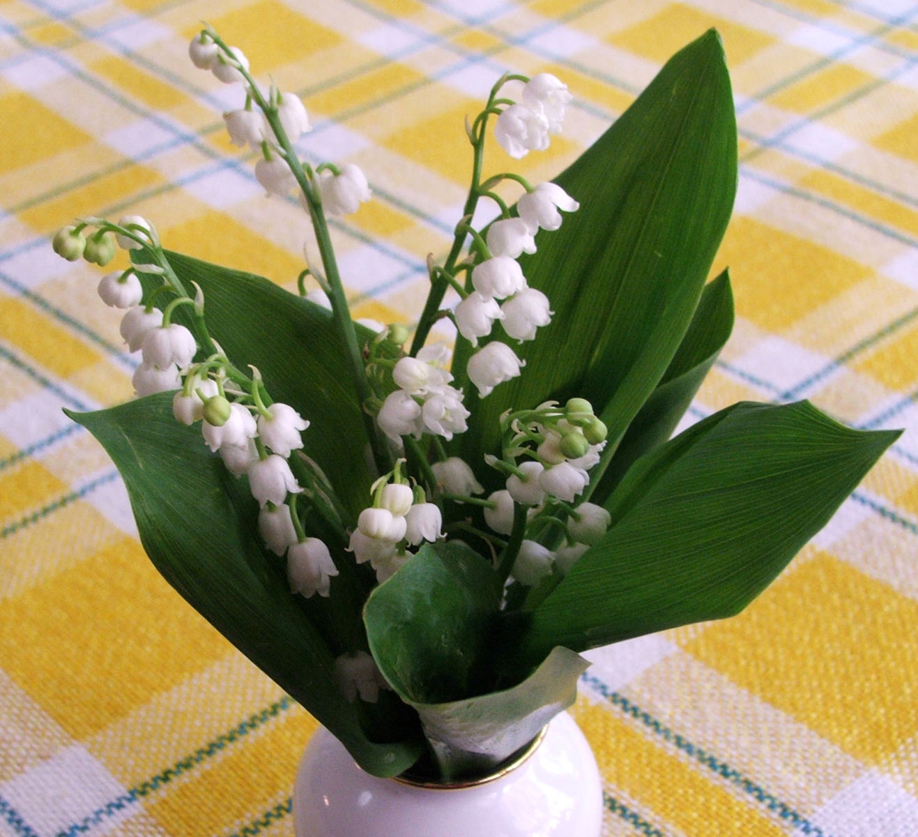 Maiglöckchen (Convallaria majalis)